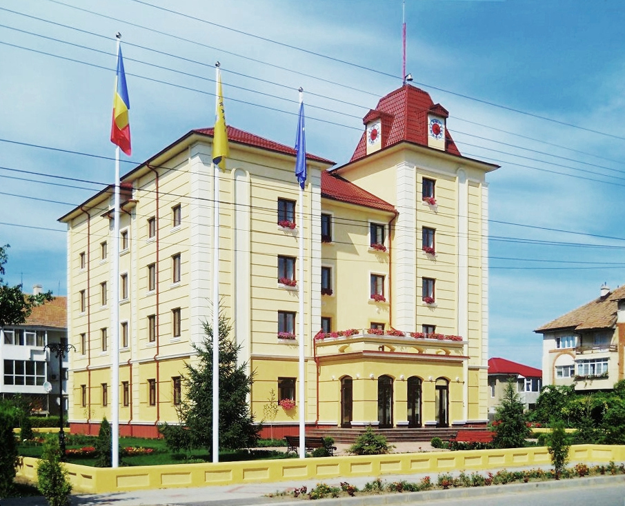 Sediul Primariei